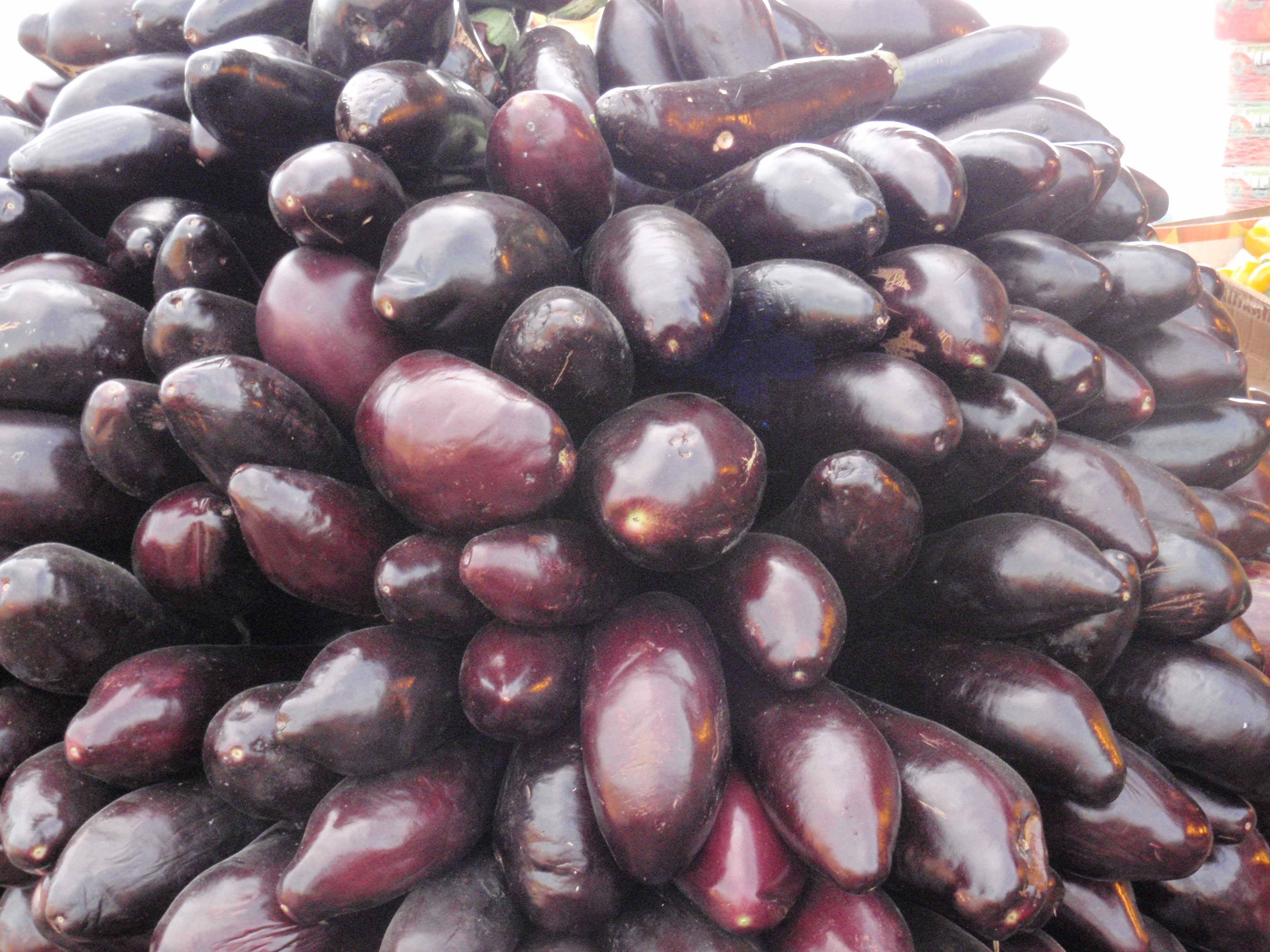 Shuk Hsayarim ירקות בשוק הסיירים Eggplant at Sayarim-Market